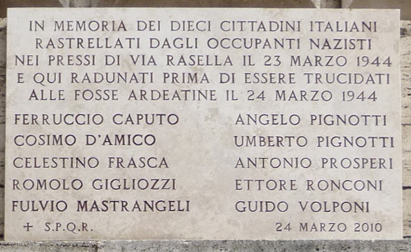 Lapide per dieci dei caduti alle Fosse ardeatine rastrellati qui dal palazzo di via Rasella e dai dintorni (2010).